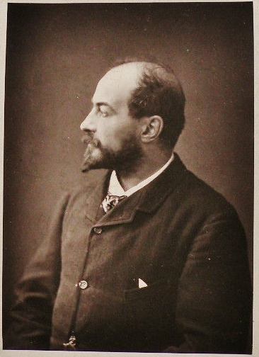 Ferdinand Mulnier , Portrait de Léon Couturier (vers1880-1900), photoglyptie parue in Auguste Lepage, « Léon Couturier », Galerie contemporaine des illustrations françaises, Paris, Éd. Paul de Lacroix, s.d.